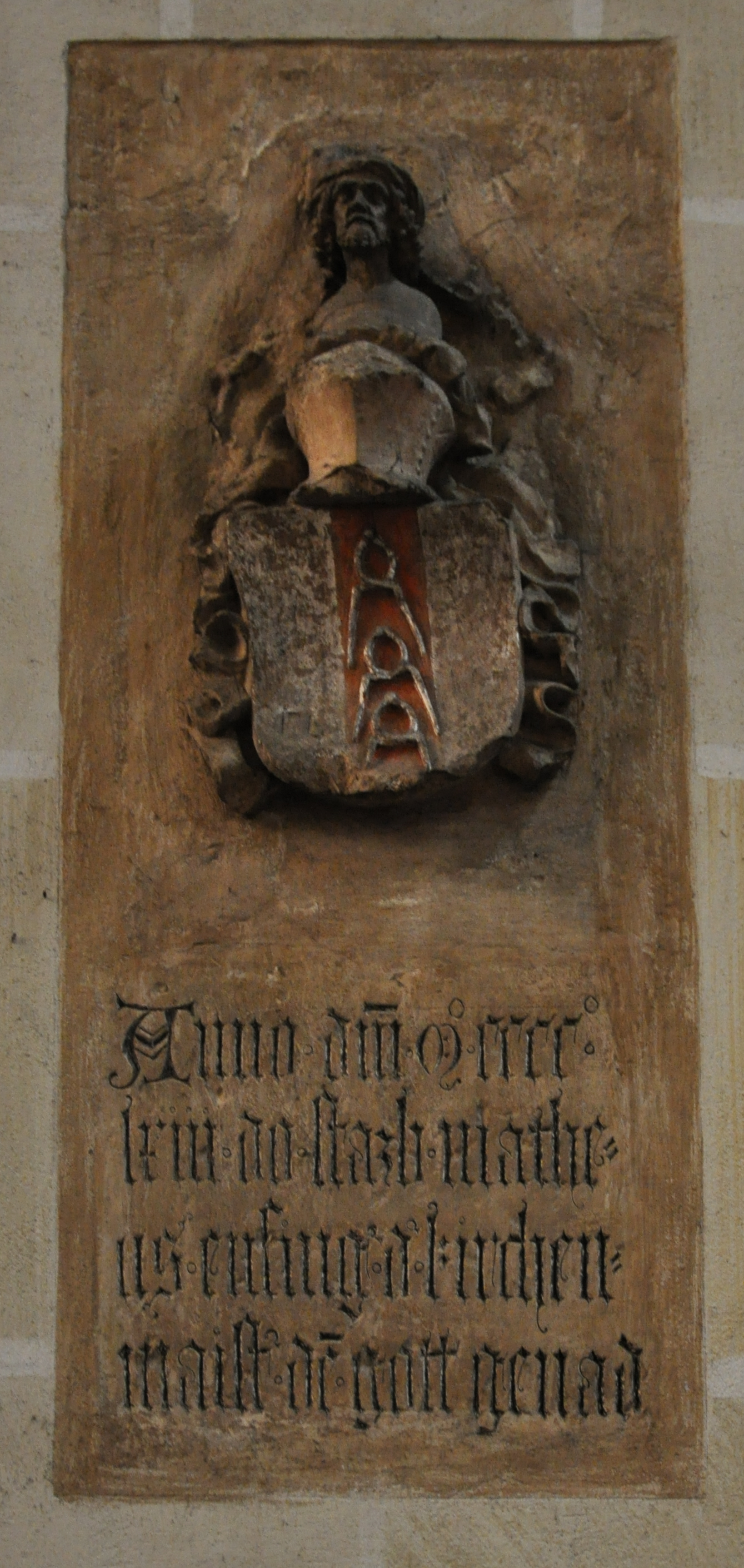 Ulm, Ulmer Münster, Gedenkstein für den Baumeister Matthäus Ensinger mit Meisterbildnis und Wappen "Anno d[o]m[ini] m cccc lxiii do starb matheus ensingen kirchenmaist. de[m] gott genad"